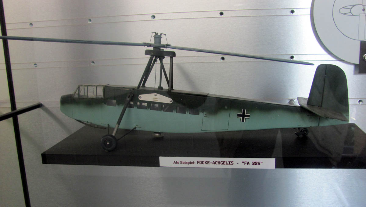 Modell des antriebslosen Experimental-Tragschraubers Focke-Achgelis Fa 225 im Hubschraubermuseum Bückeburg